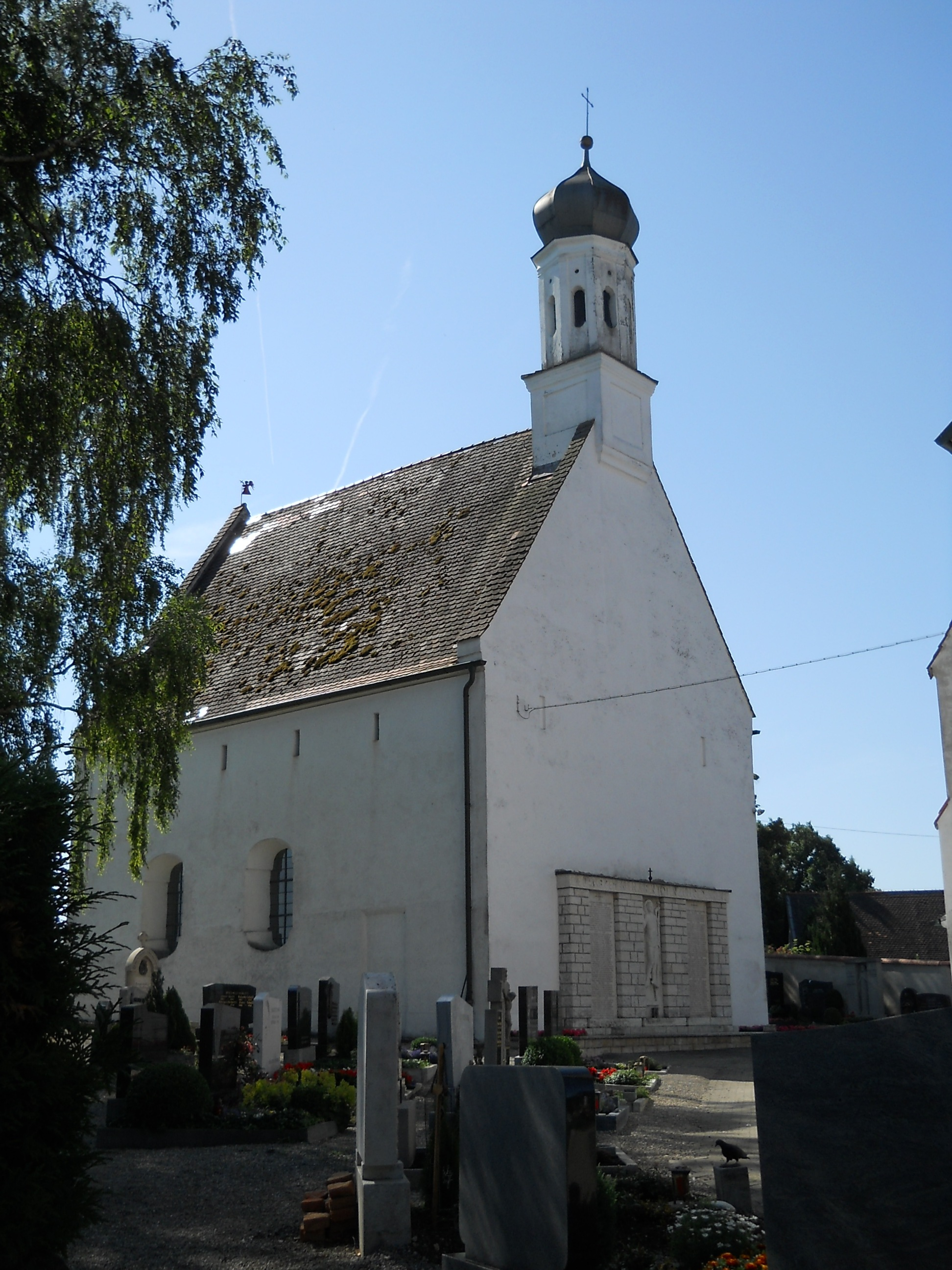 Gempfing (Ortsteil von Rain am Lech im Landkreis Donau-Ries), Frauenkapelle/Friedhofskapelle